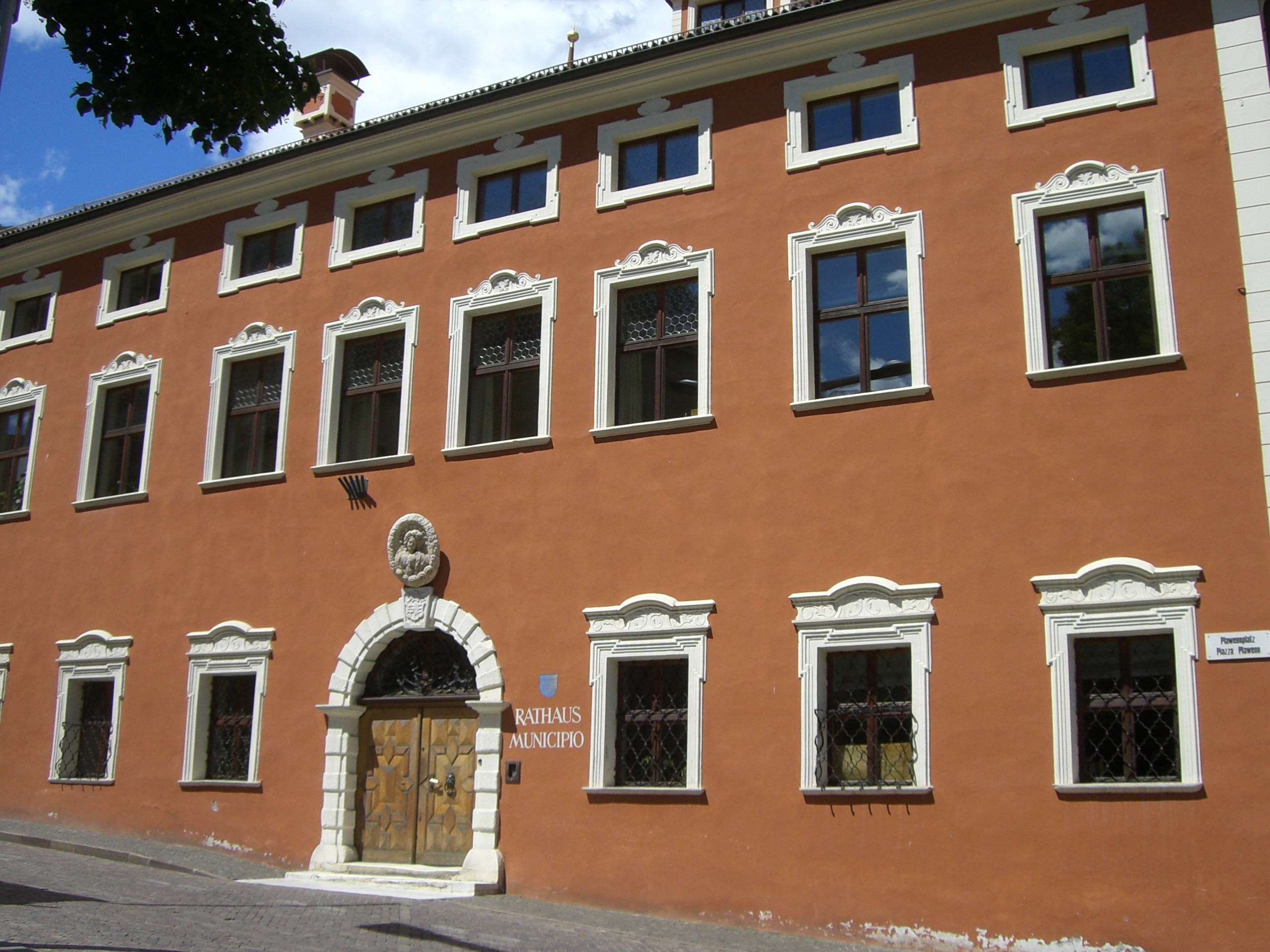 Vorderansicht des Gemeindegebäudes von Schlanders